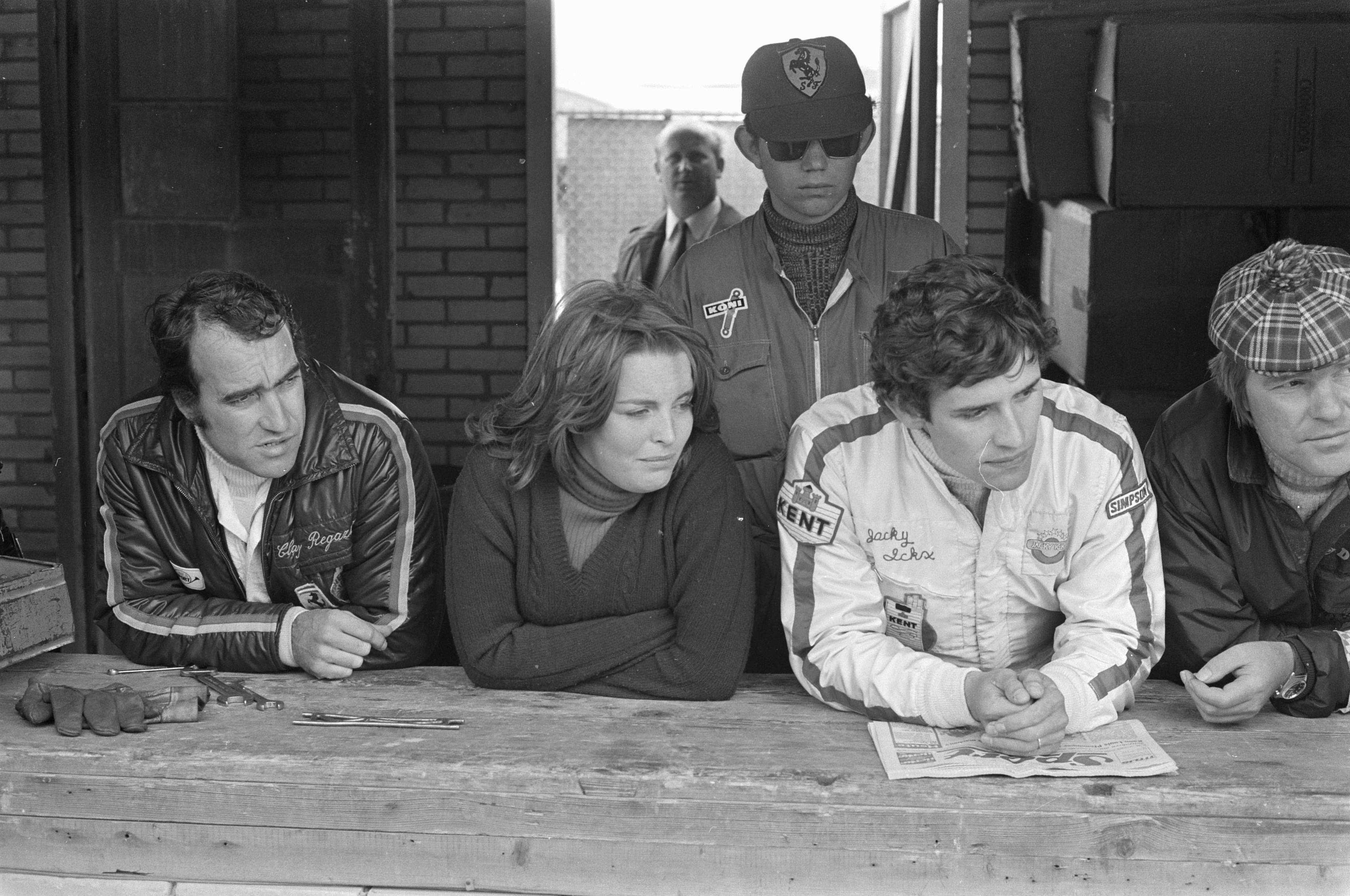 Collectie / Archief : Fotocollectie Anefo Reportage / Serie : Training voor de Grand Prix van 1971 op Zandvoort voor formule 1-wagens Beschrijving : V.l.n.r. Clay Regazzoni (Zwitserland), Catherine Blaton (de echtgenote van Ickx) en Jacky Ickx (België) Datum : 18 juni 1971 Locatie : Noord-Holland, Zandvoort Trefwoorden : autosport, circuits, raceauto's, races, wedstrijden Persoonsnaam : Blaton, Catherine, Ickx, Jacky, Regazzoni, Clay Fotograaf : Fotograaf Onbekend / Anefo, [onbekend] Auteursrechthebbende : Nationaal Archief Materiaalsoort : Negatief (zwart/wit) Nummer archiefinventaris : bekijk toegang 2.24.01.05 Bestanddeelnummer : 924-6609